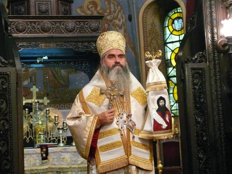 Негово Високопреосвещенство Варненски и Великопреславски митрополит Кирил